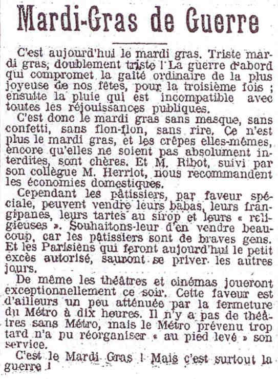 Article sur le Mardi Gras 1917.